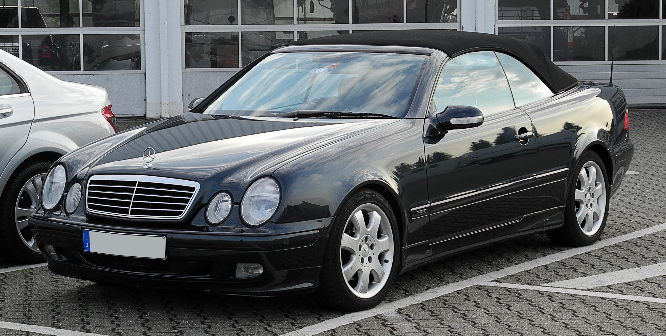 Mercedes-Benz CLK-Klasse Cabriolet Avantgarde (A 208, Facelift)